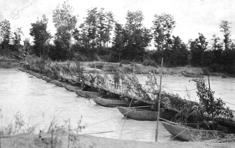 Avstro-ogrski pantonski mostovi čez Piavo med bitko na reki Piavi.